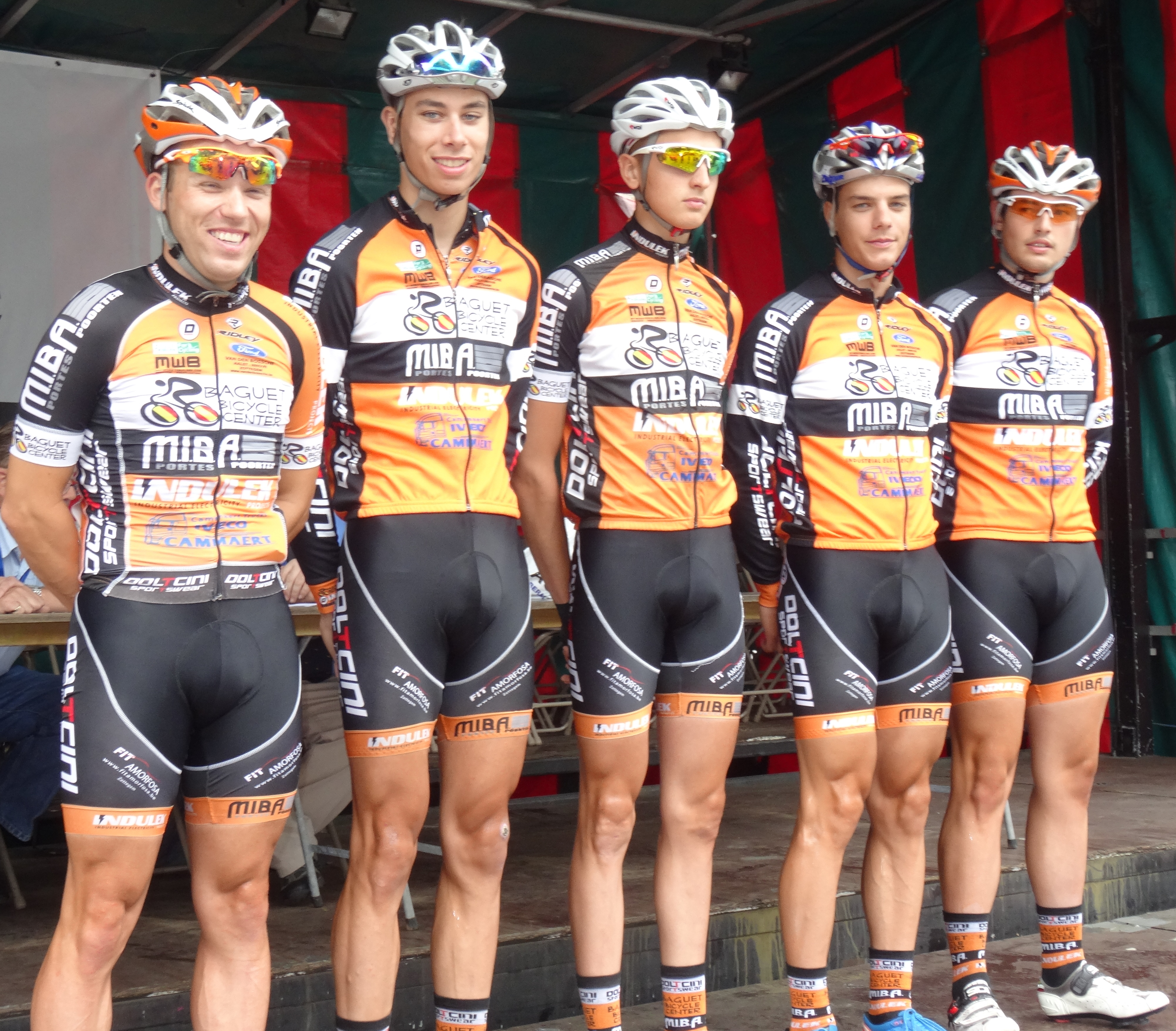 Reportage photographique réalisé le dimanche 10 août à l'occasion du départ et de l'arrivée de la Flèche du port d'Anvers 2014 à Merksem (Anvers), Belgique.